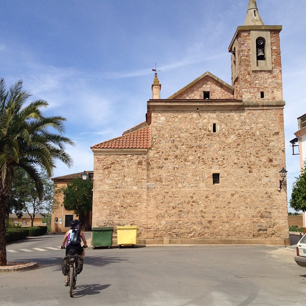 Iglesia de la Purísima Concepción de Torremejía, municipio de Badajoz, España.